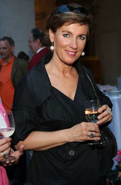 Kardinal S chönborn, Medienempfang, Erzbischöfliches Palais